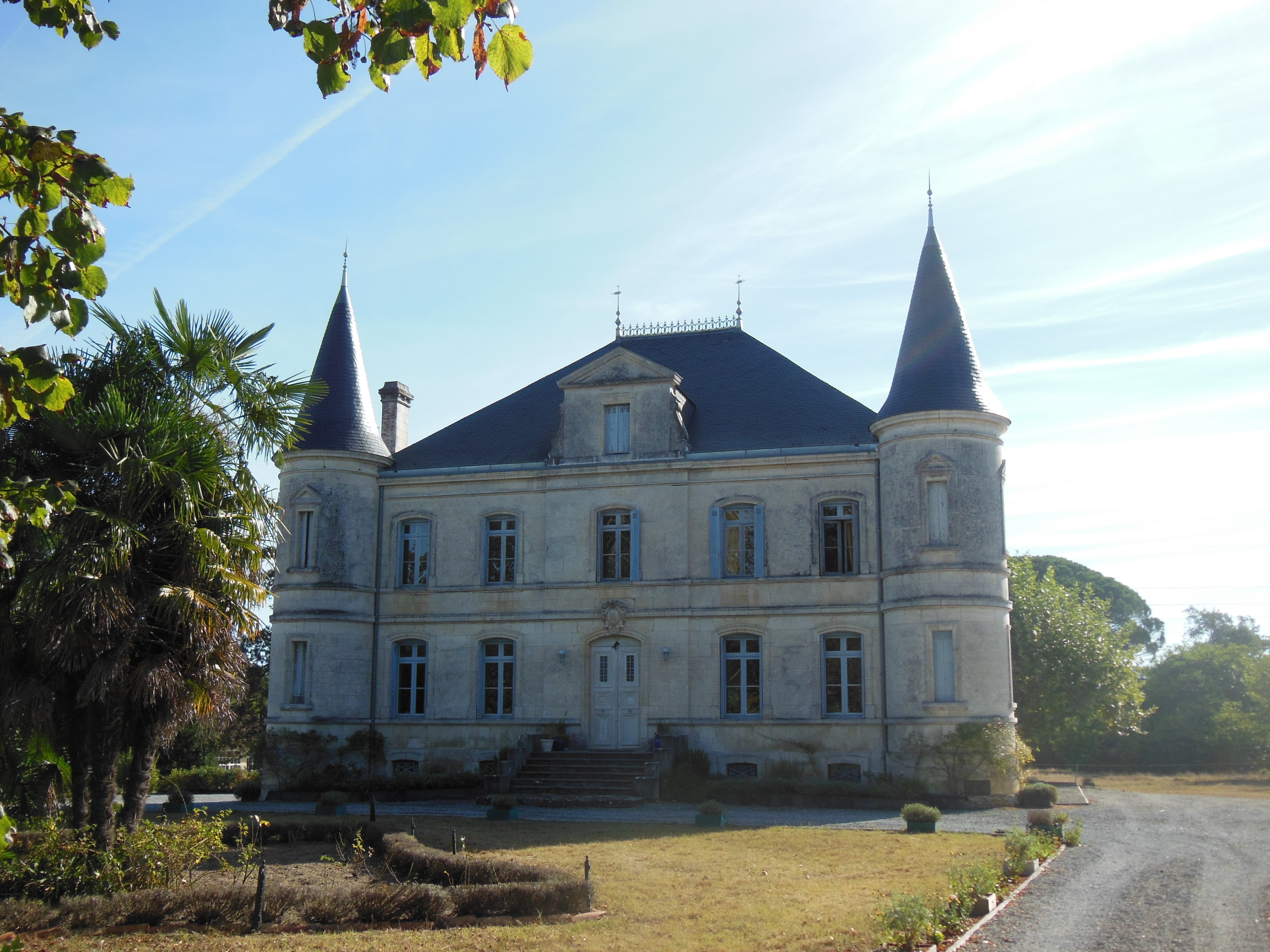 Château d'Ages, à Morcenx-bourg, dans le département français des Landes